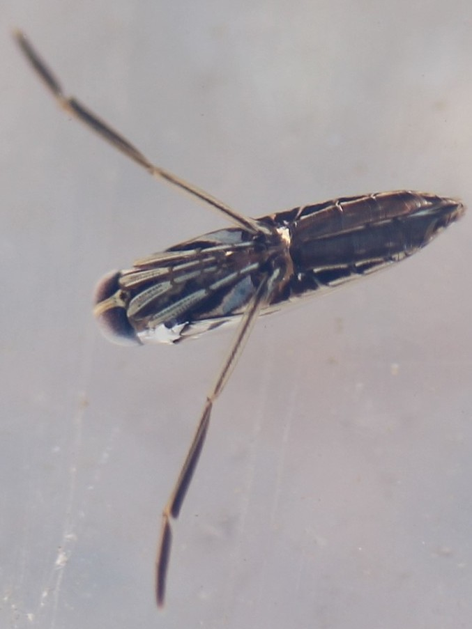 Buenoa sp. Северная Америка, США, окрестности Вашингтона.